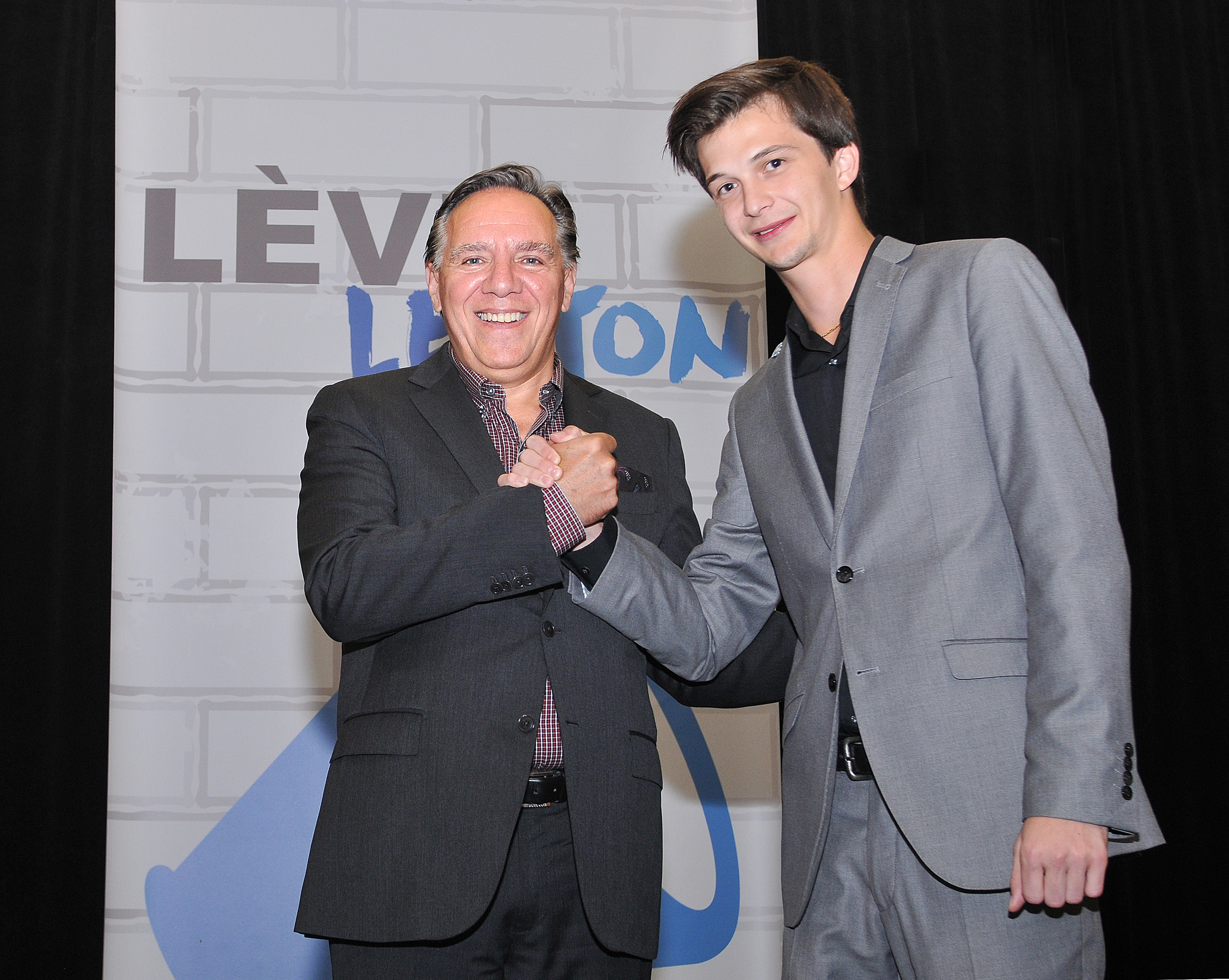 François Legault avec Yann Gobeil-Nadon au Congrès des membres de la CRCAQ le 13 septembre 2015